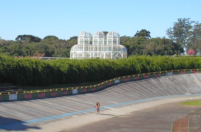 Velódromo de Curitiba, localizado dentro do Jardim Botânico de Curitiba, Paraná, região sul do Brasil.